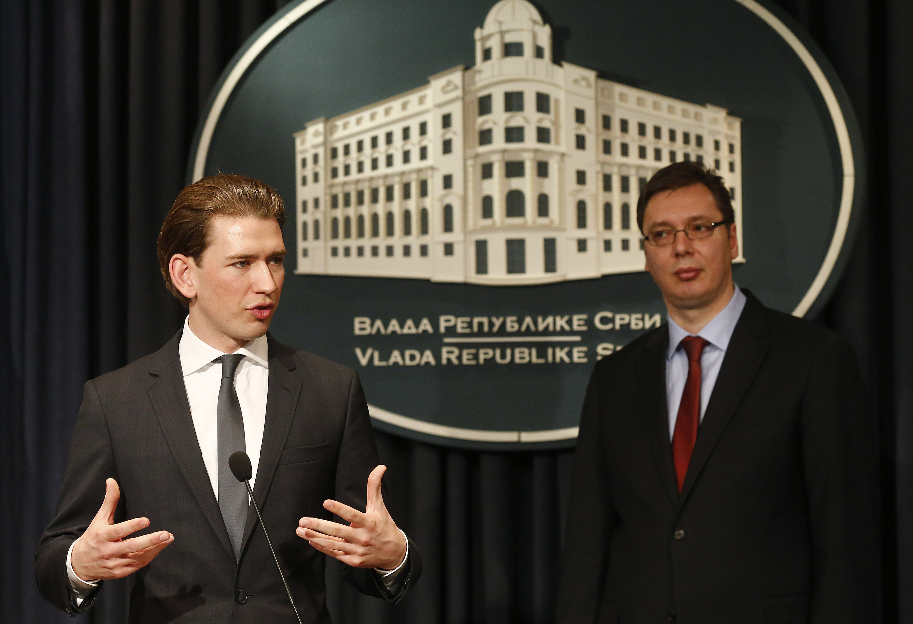 Arbeitsbesuch Serbien, Außenminiser Sebastian Kurz trifft den serbischen Vizepremierminister Aleksandar Vucic. Belgrad, 26.02.2013, Foto: Dragan Tatic